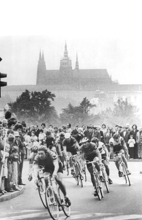 Friedensfahrt, Fahrerfeld, Stadtdurchfahrt PI-CTK-22.5.77-ku Prag: 30.Internationale Friedensfahrt . Das Ziel isr greifbar nah,in rasender Fahrt hatten sich 114 Radsportler aus 19 Ländern bei der Jubiläumsfahrt auf den Straßen des Friedens bewährt, nun sind sie in der goldenen Stadt Prag, und es geht um die letzten Minuten.